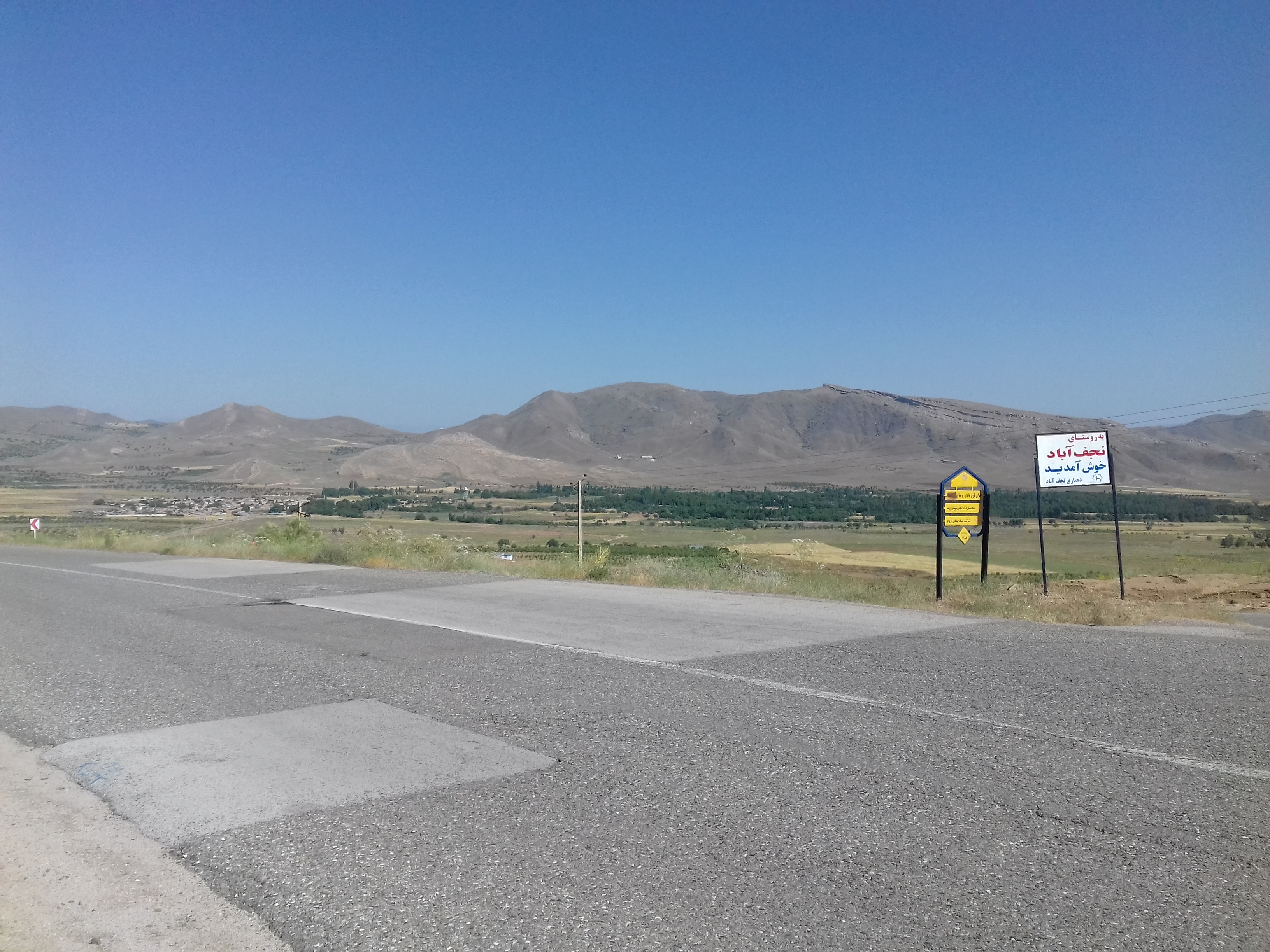 تصاویری از حومه روستای نجف آباد ارومیه، شامل طبیعت بکر و ورودی و... را مشاهده میکنید